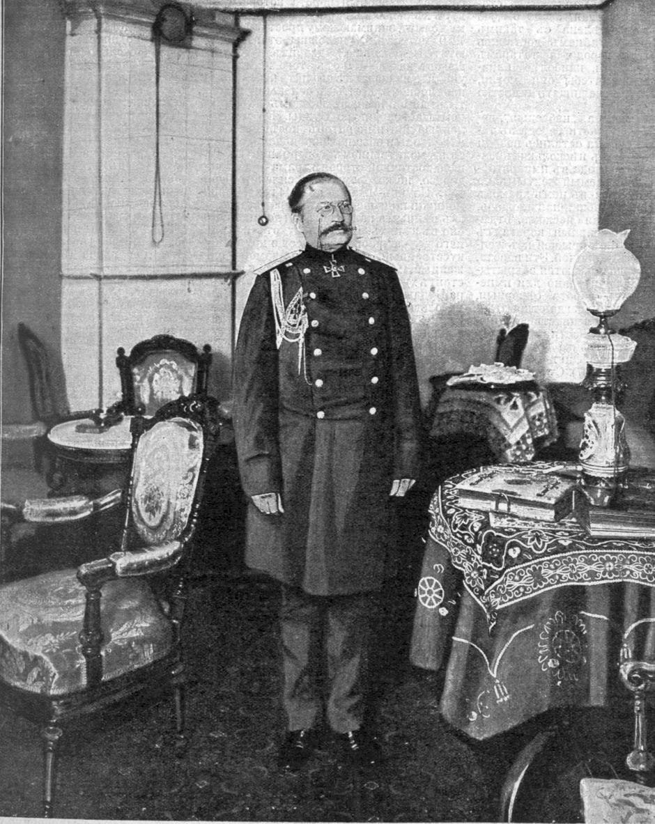 Государственный контролёр, генерал-лейтенант П.Л. Лобко в своём приёмном зале